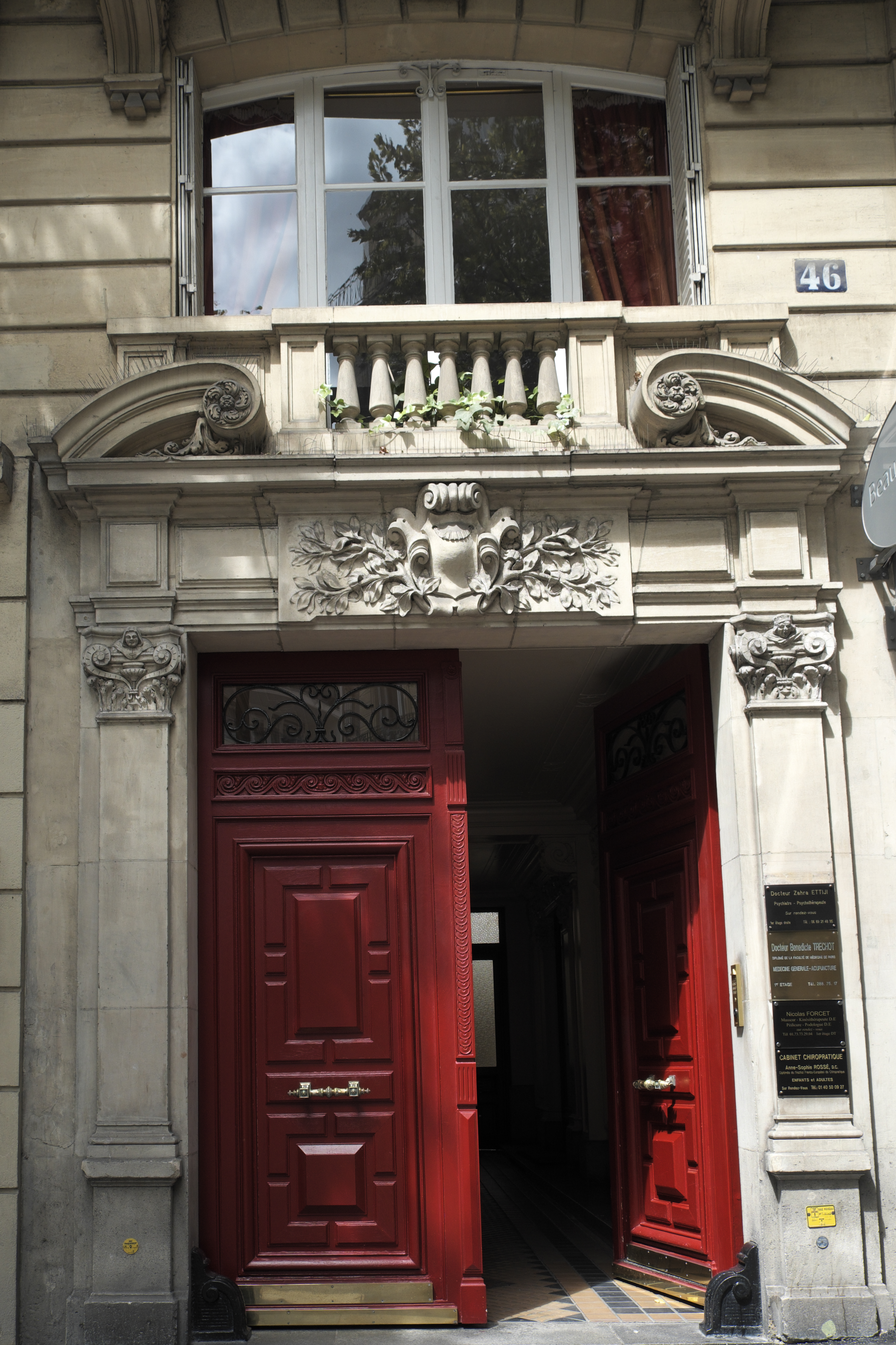 Avenue Mozart n° 46 im 16. Arrondissement in Paris (Île-de-France/Frankreich), Haustür